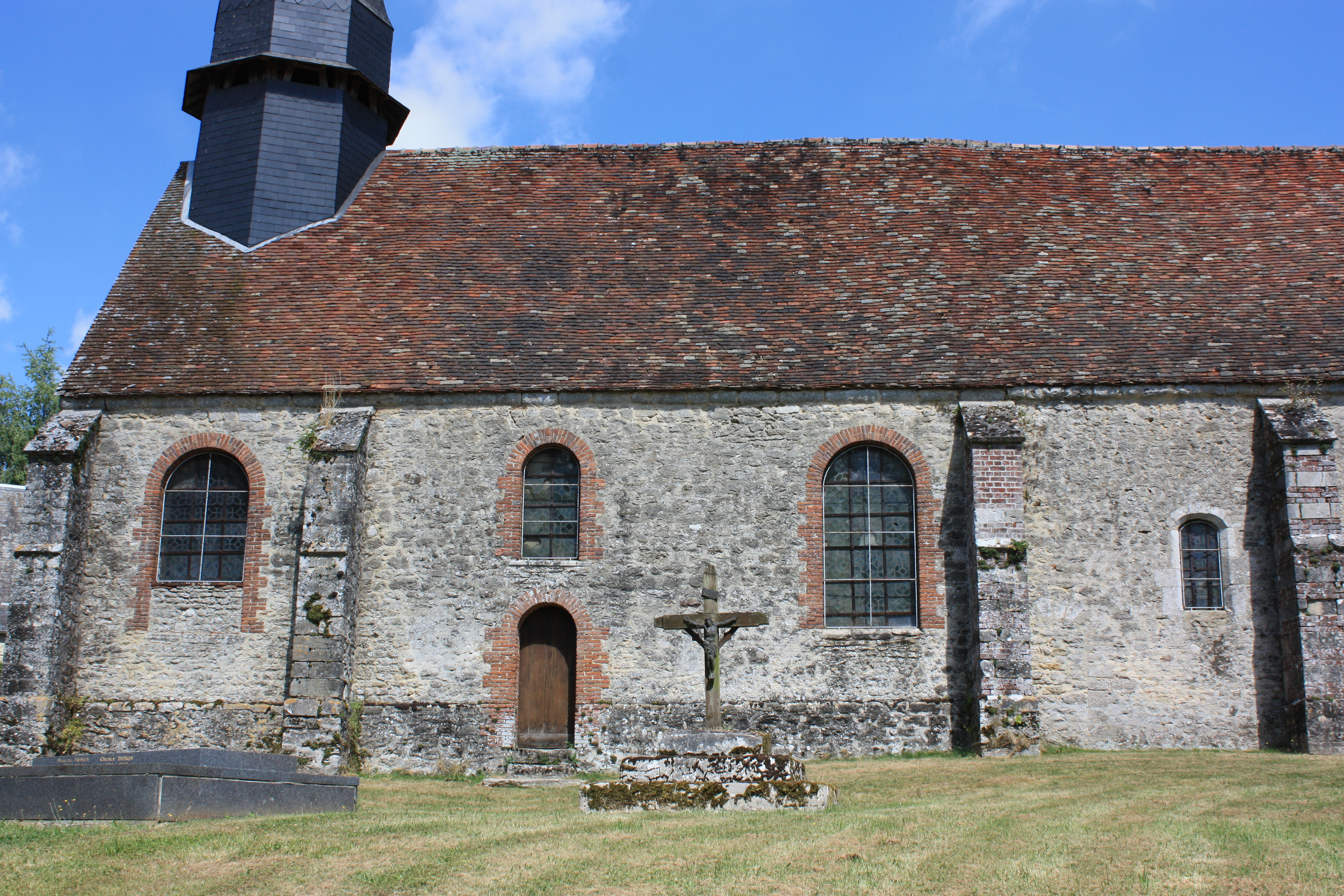 Eglise Saint-Germain à Mothois, vue du Sud